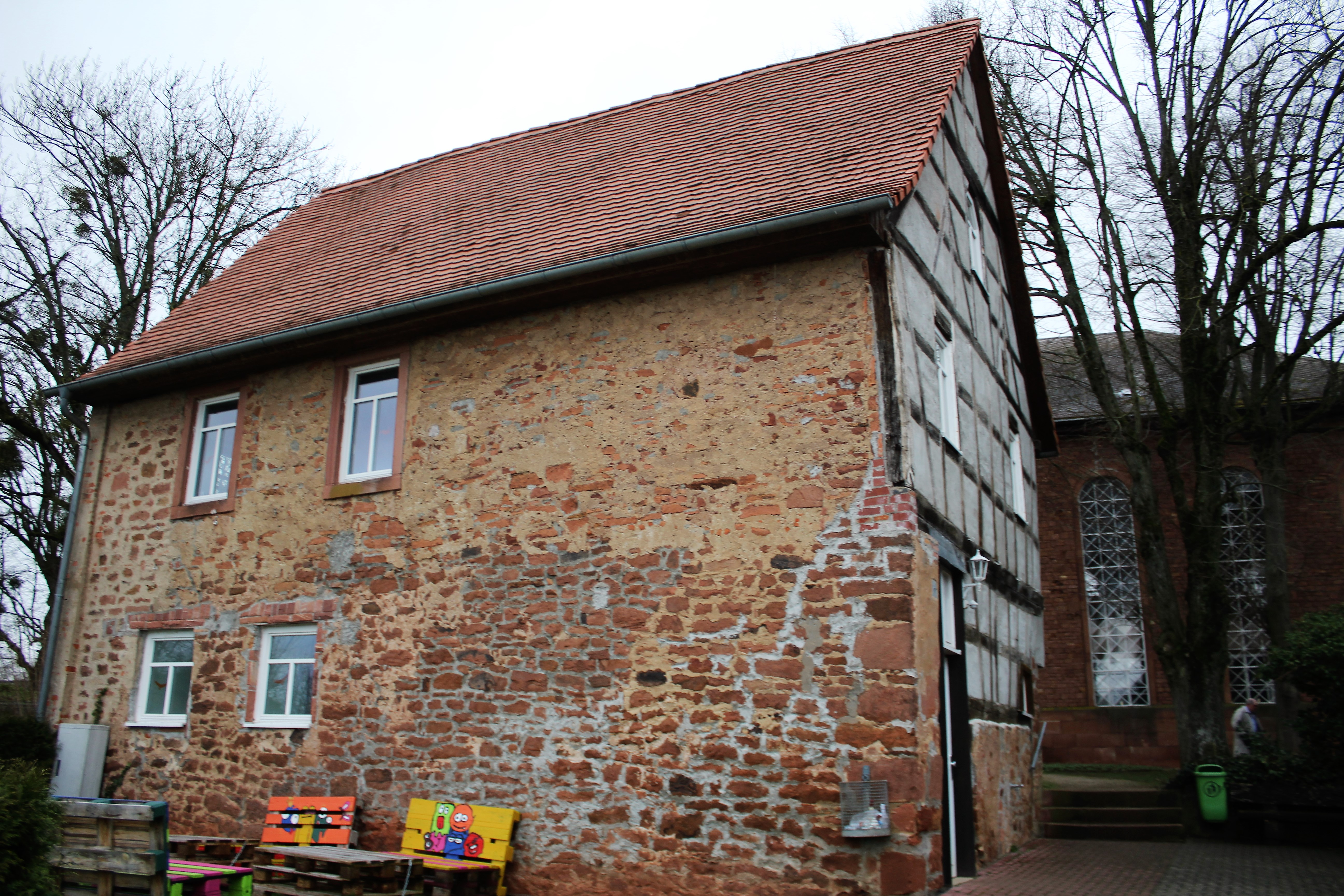 Evangelische Kirche Niedergründau, Gemeinde Gründau, Main-Kinzig-Kreis, Hessen, Deutschland